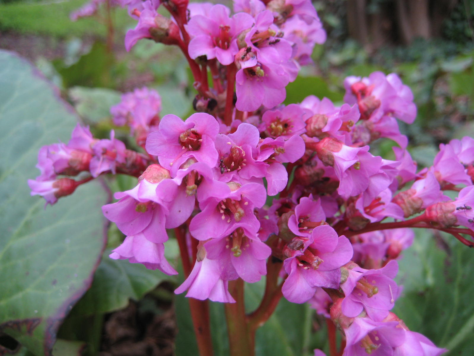 Bergenia cordifolia - Blüte - Im Bot. Garten Berlin Dahlem